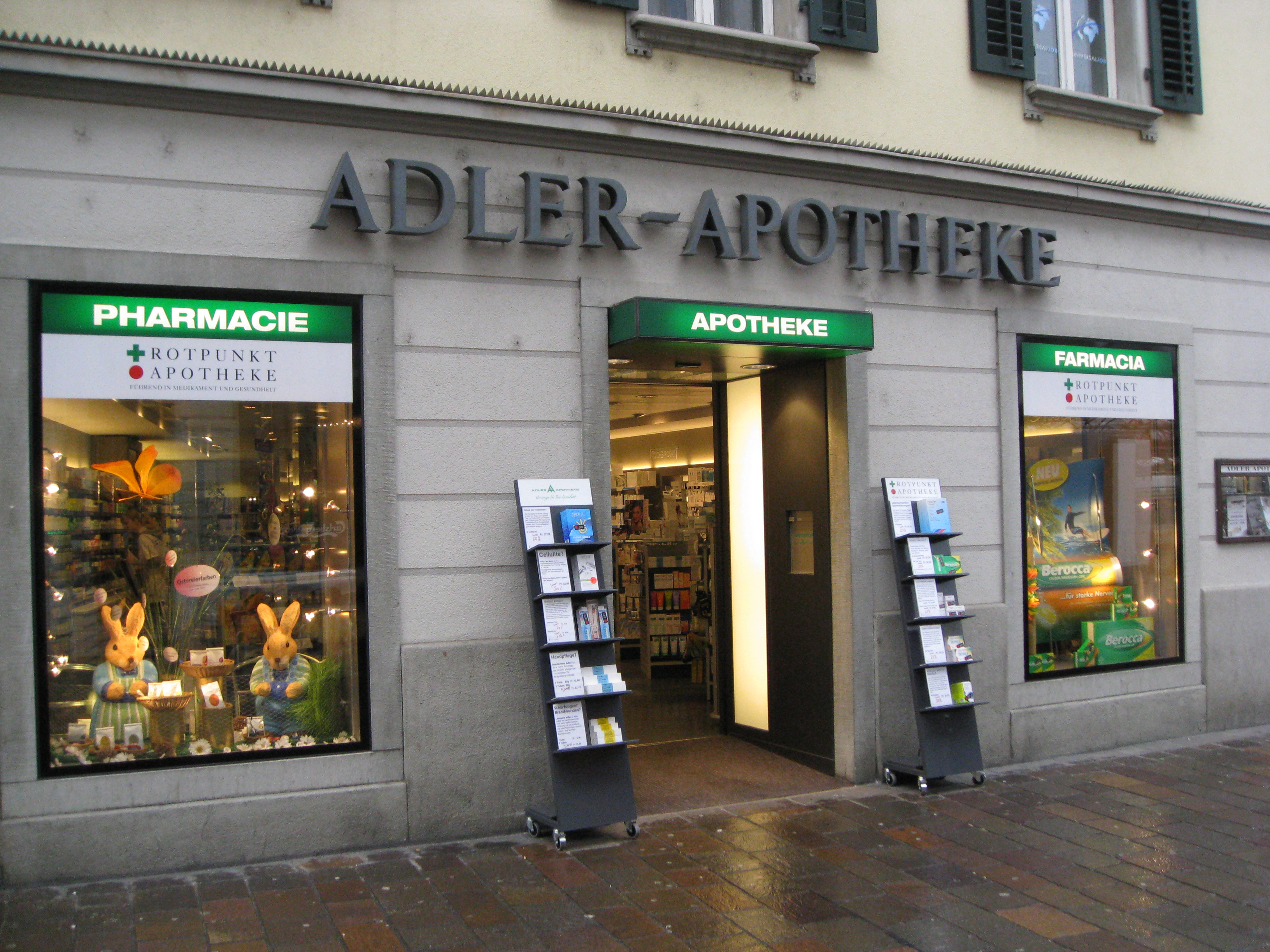 Seiteneingang von der Altstadt in die Adler-Apotheke, Winterthur, Schweiz